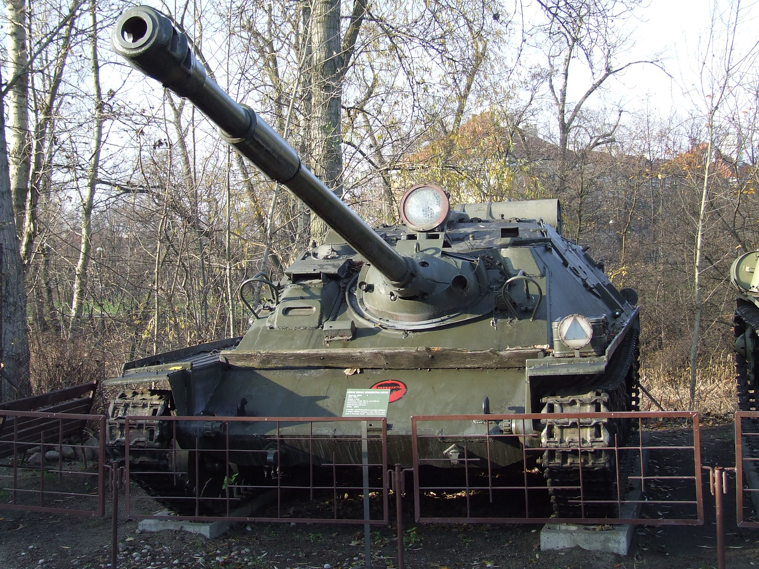 ASU-85, 6 Pomorska Dywizja Powietrznodesantowa, Muzeum Wojska Polskiego – Czerniaków